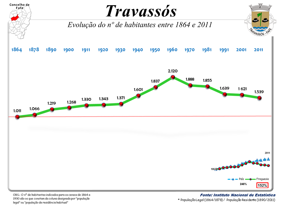 Censos 1864/2011